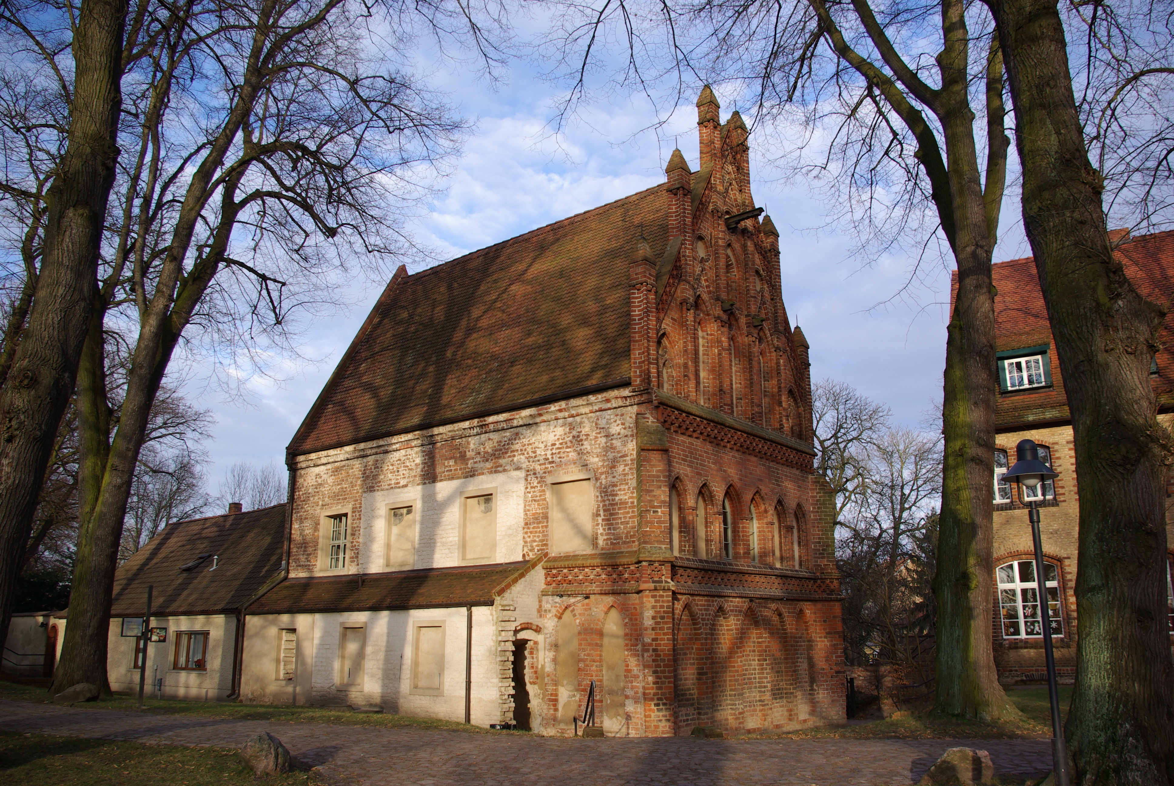 Kloster Lehnin in Brandenburg. Das Königshaus ist Teil des Klosters Lehnin und steht unter Denkmalschutz.